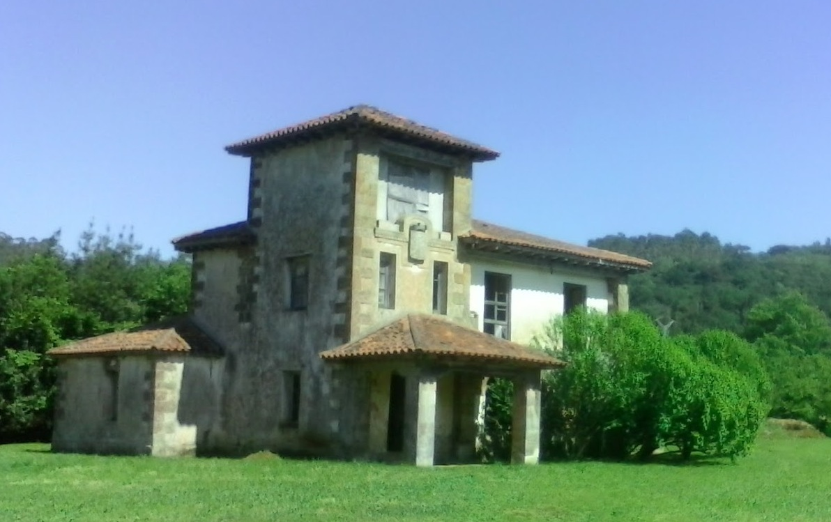 Casona ubicada en Cigueña (Cantabria).